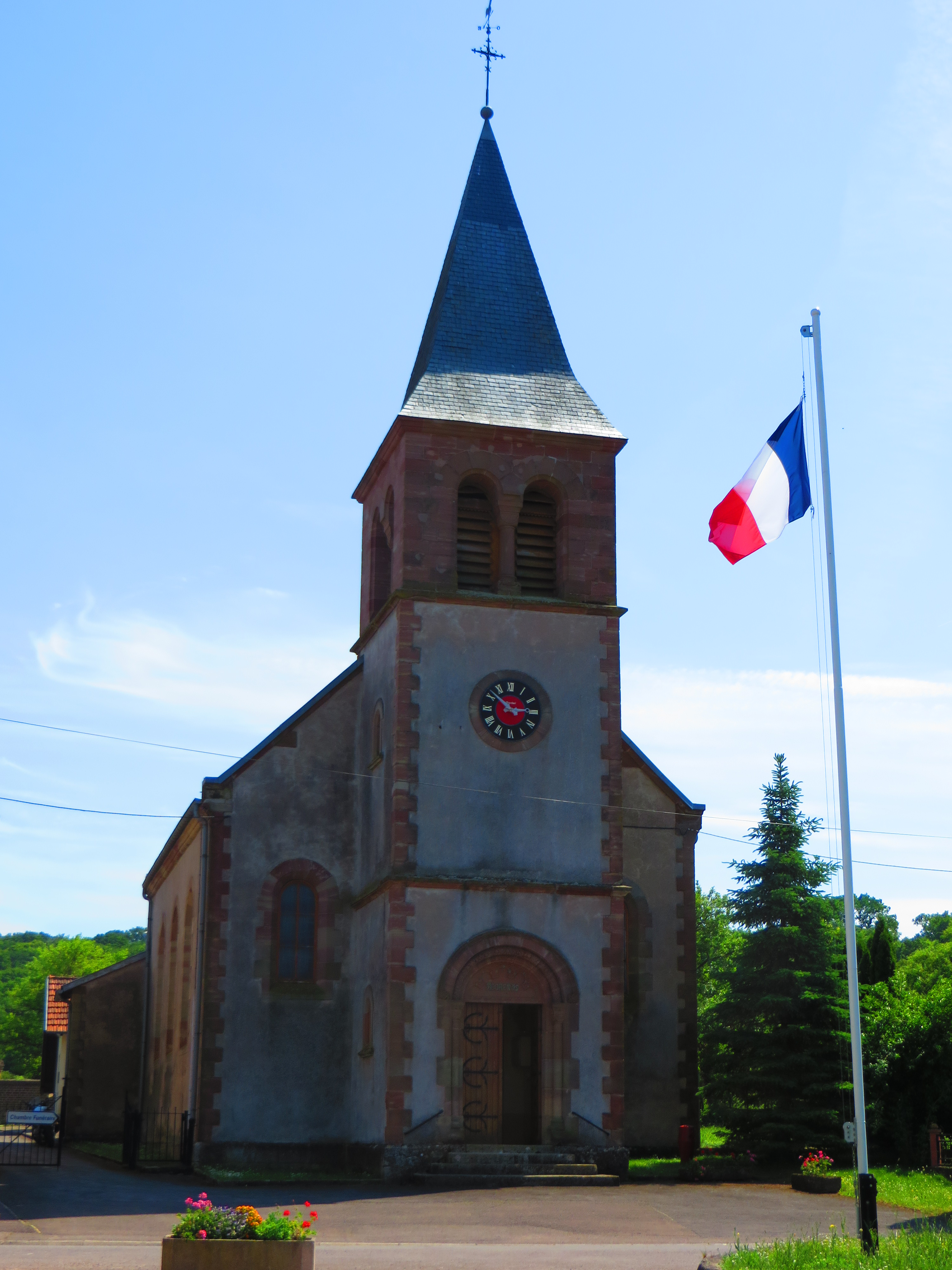 Colmen eglise